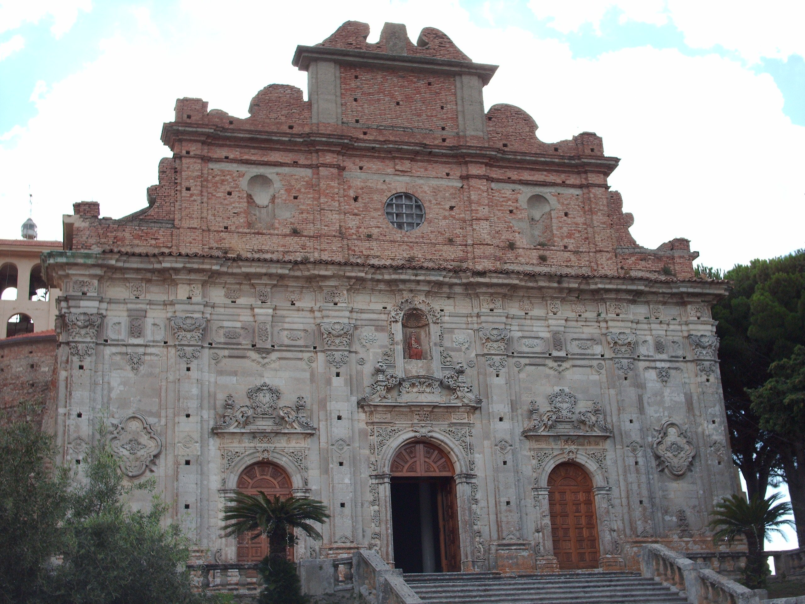 Dome in Montalto Uffugo (CS)